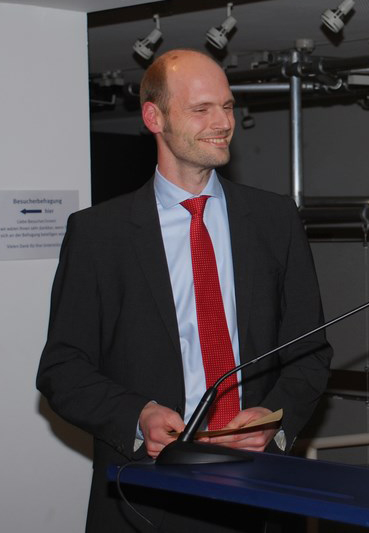 Wolf-Erich-Kellner-Preis Verleihung 2015. Henning Türk, Laudator Prof. Joachim Scholtyseck